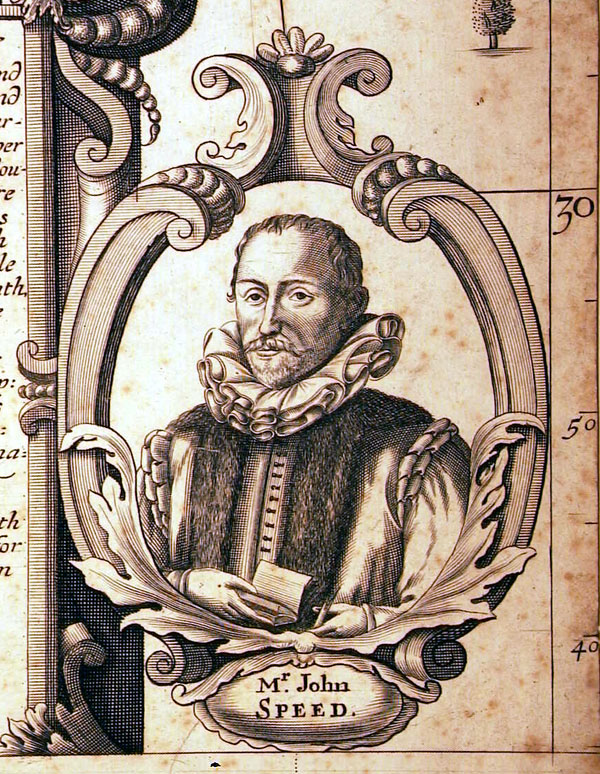 Speed's portret op een wandkaart van Canaan